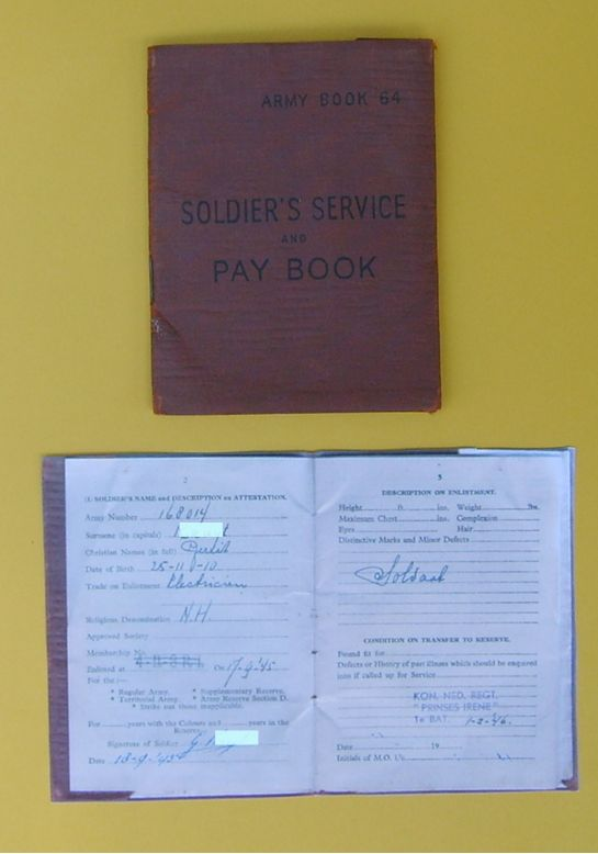 picture of army book of member of Dutch resistance (appended to Pr. Irene Brigade, after WW2); name made invisible for privacy reasons.